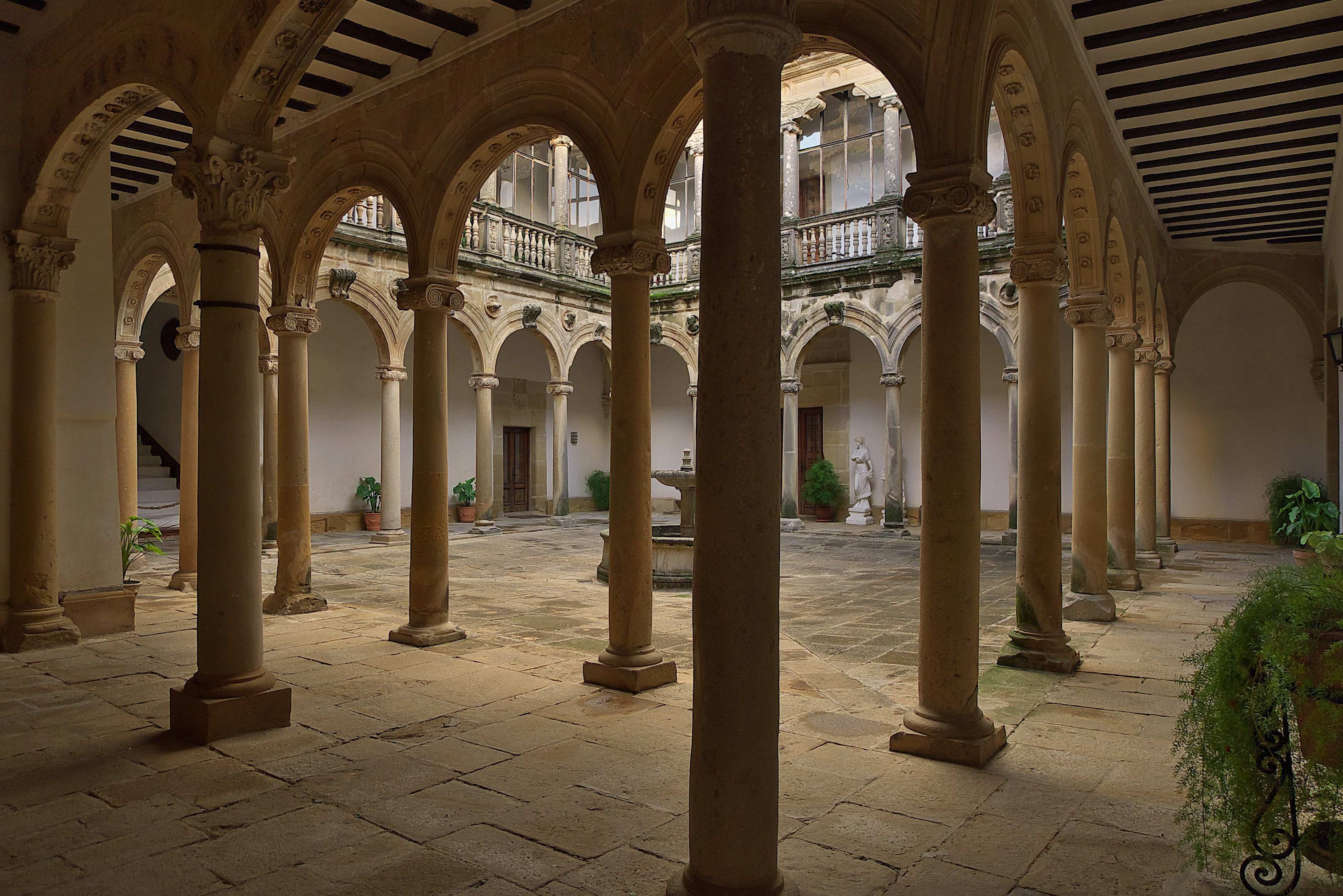 Francisco de los Cobos y Molina contrata (1538) a Andrés de Vandelvira su castillo en Canena (Jaén).